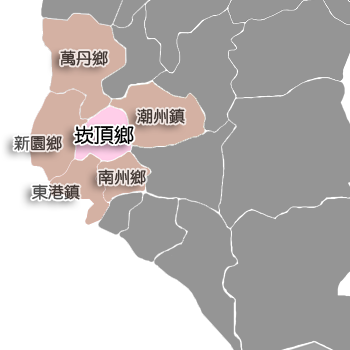 屏東縣崁頂鄉相對位置。